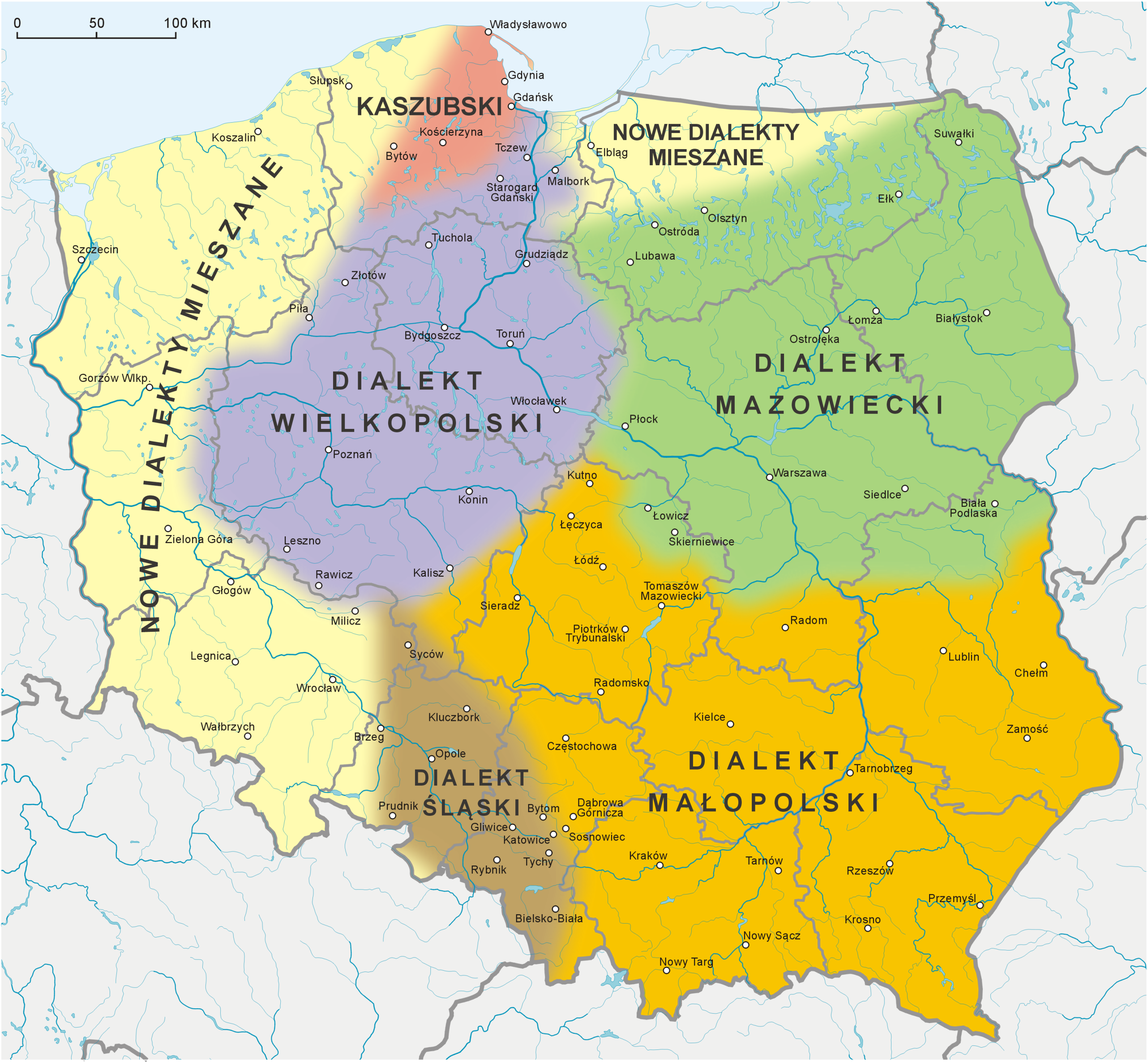 Zasięgi dialektów polskich wg S. Urbańczyka (zmodyfikowane), na podstawie Gwary polskie. Przewodnik multimedialny pod redakcją H. Karaś